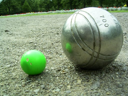 Boule-Kugel, Public Domain: selbst fotografiert